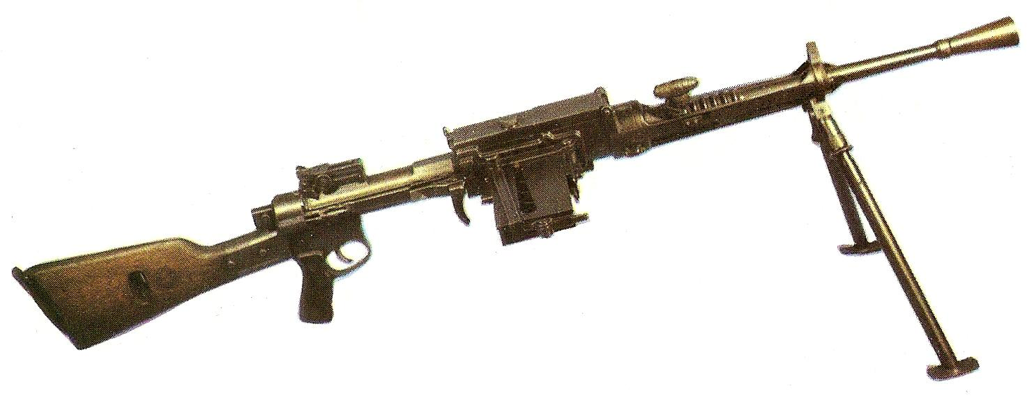 Fucile mitragliatore Breda modello 30